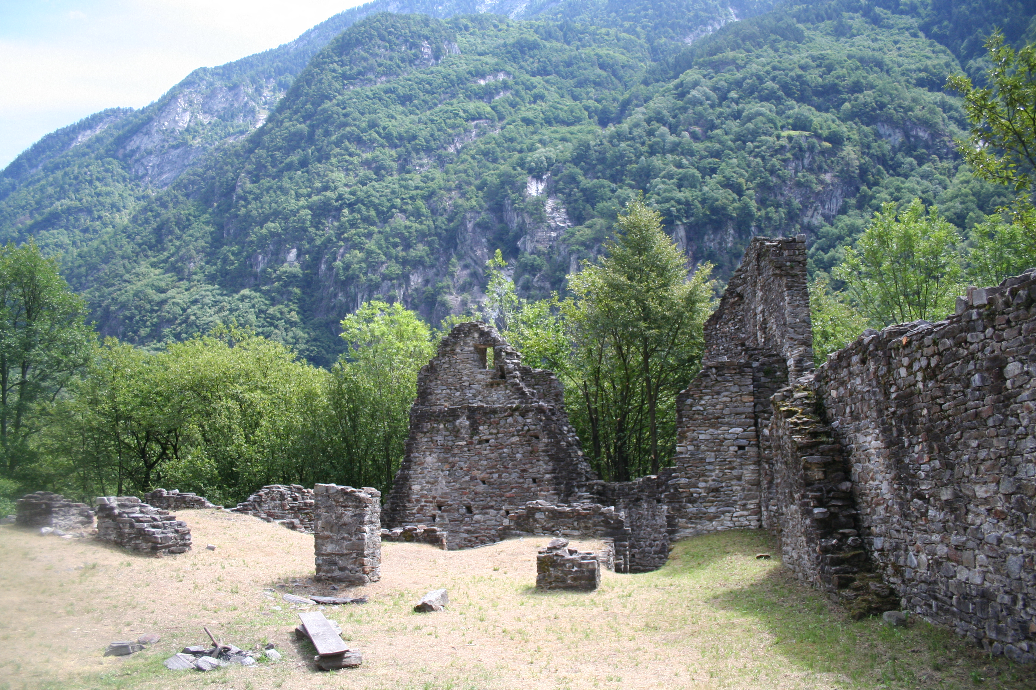 Ruine Norantola: Hof mit Ruinen der Palasmauer